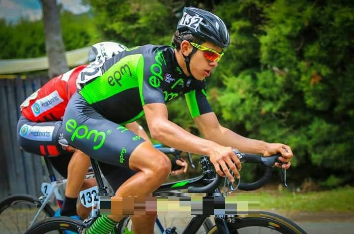 Tejada corriendo con el EPM